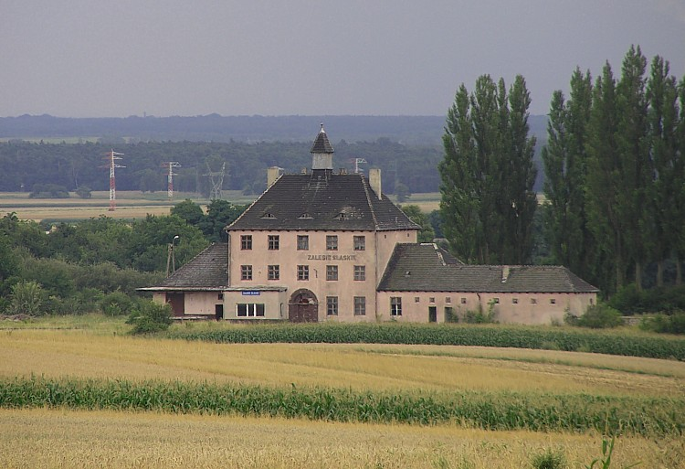 Zamknięty dworzec kolejowy w Zalesiu Śląskim. Fot. 2005 Paweł Grzywocz